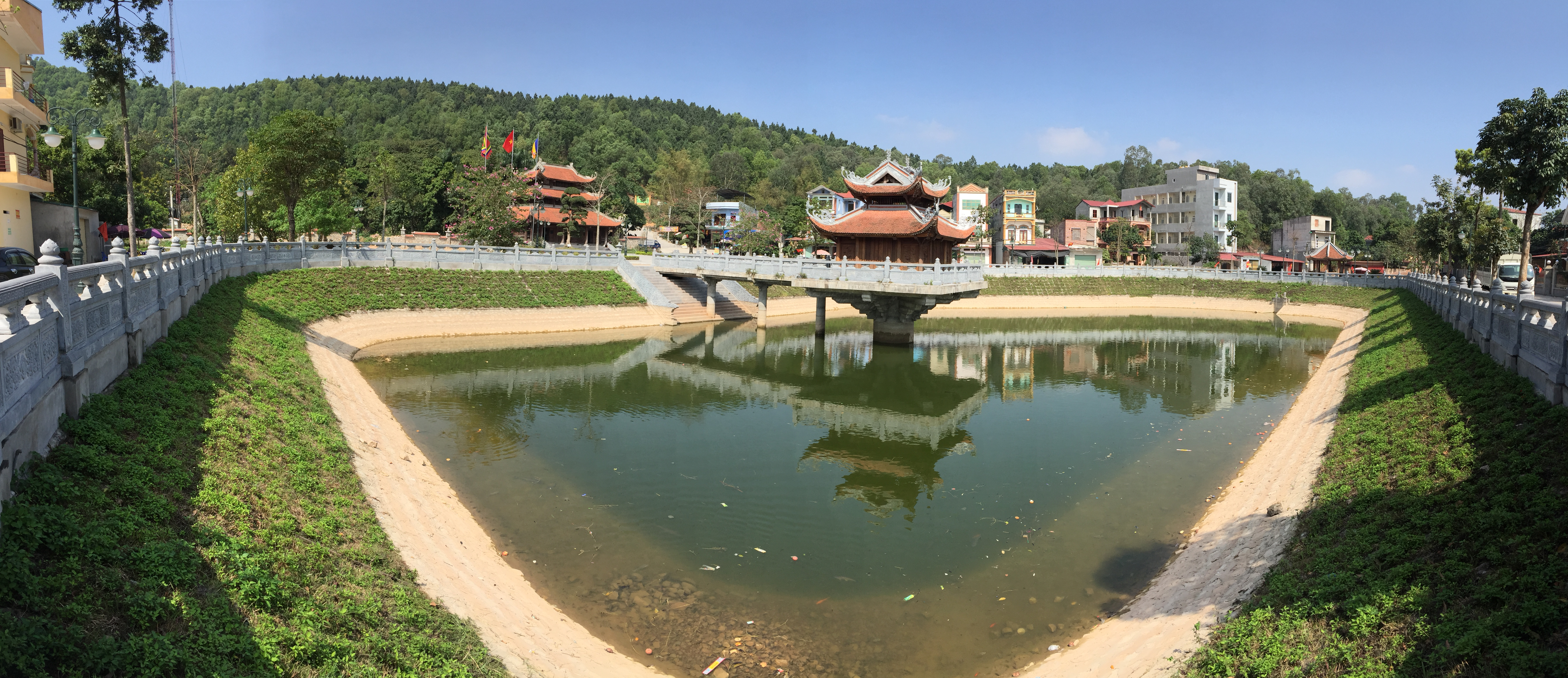 Panorama hồ cảnh quan chùa Hàm Long